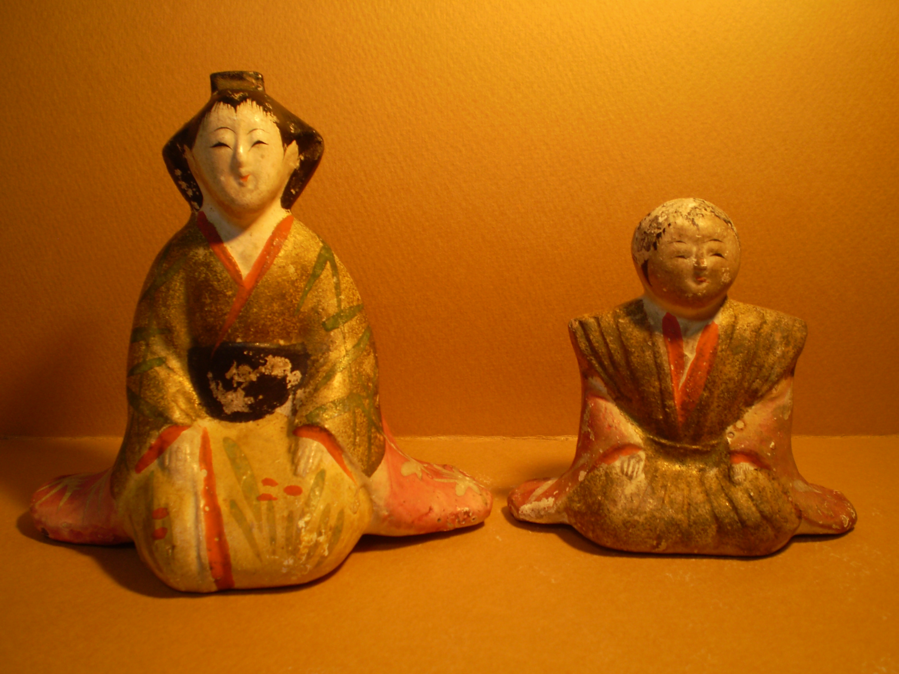 今戸人形「裃雛」（江戸時代後期） 今戸焼